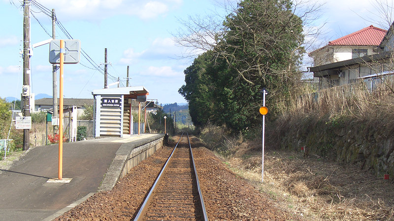 JR肥薩線西人吉駅 ホーム 西側の踏切より撮影 写真手前が八代駅方面。奥が人吉駅方面。 撮影者/著者/著作権保有者 : MK Products (本人がアップロード) 撮影日 : 2007/03/07 西人吉駅用にアップロードした画像です。良い画像があれば別の画像に変えてください。